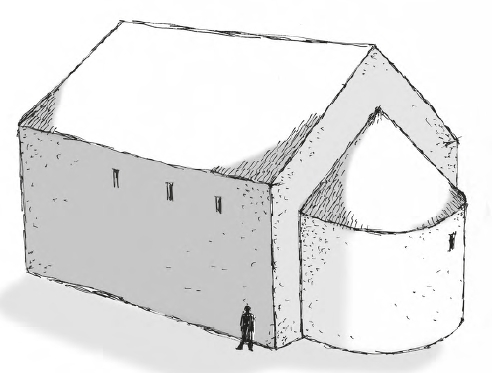 Rekonstruktion 2. Bauphase (8. Jahrhundert) durch Prof. B. Scholkmann